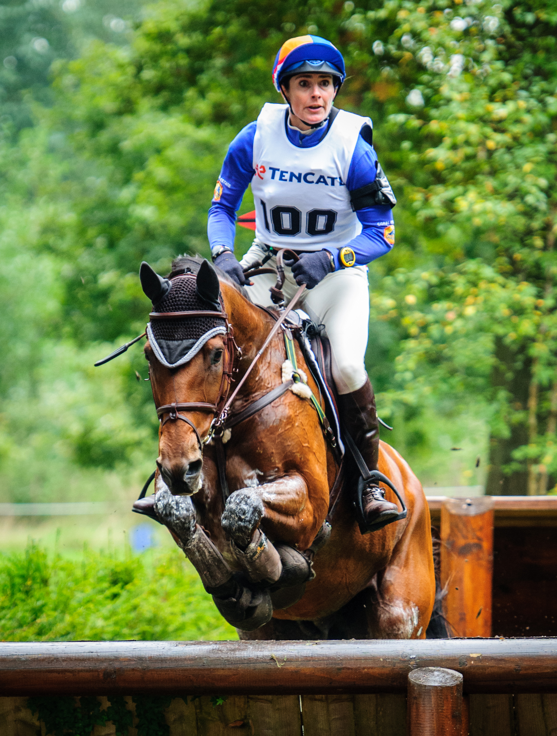 Military Boekelo 2013: Alice Naber-Lozeman & Peter Parker